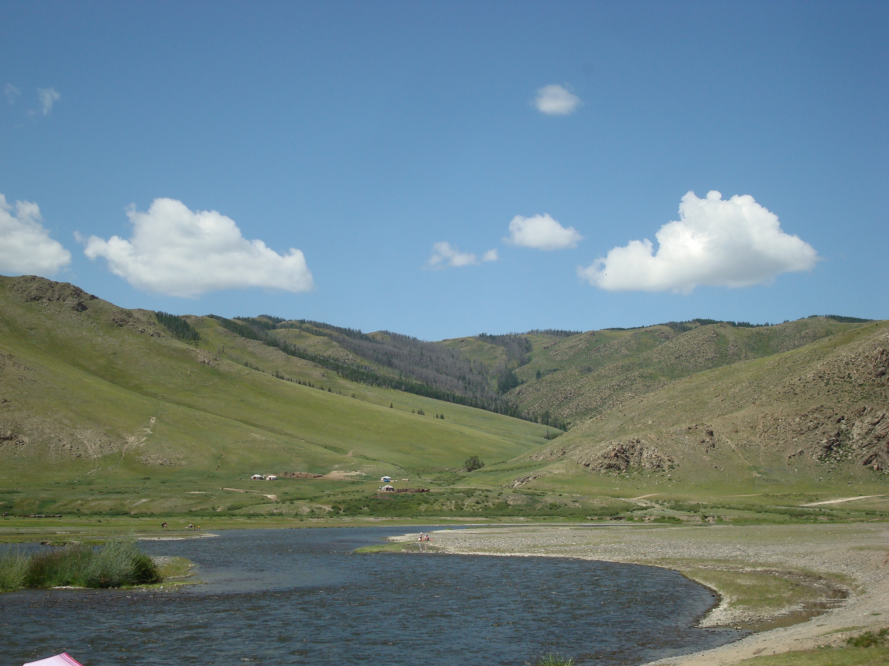 Der Orchon nahe Charchorin